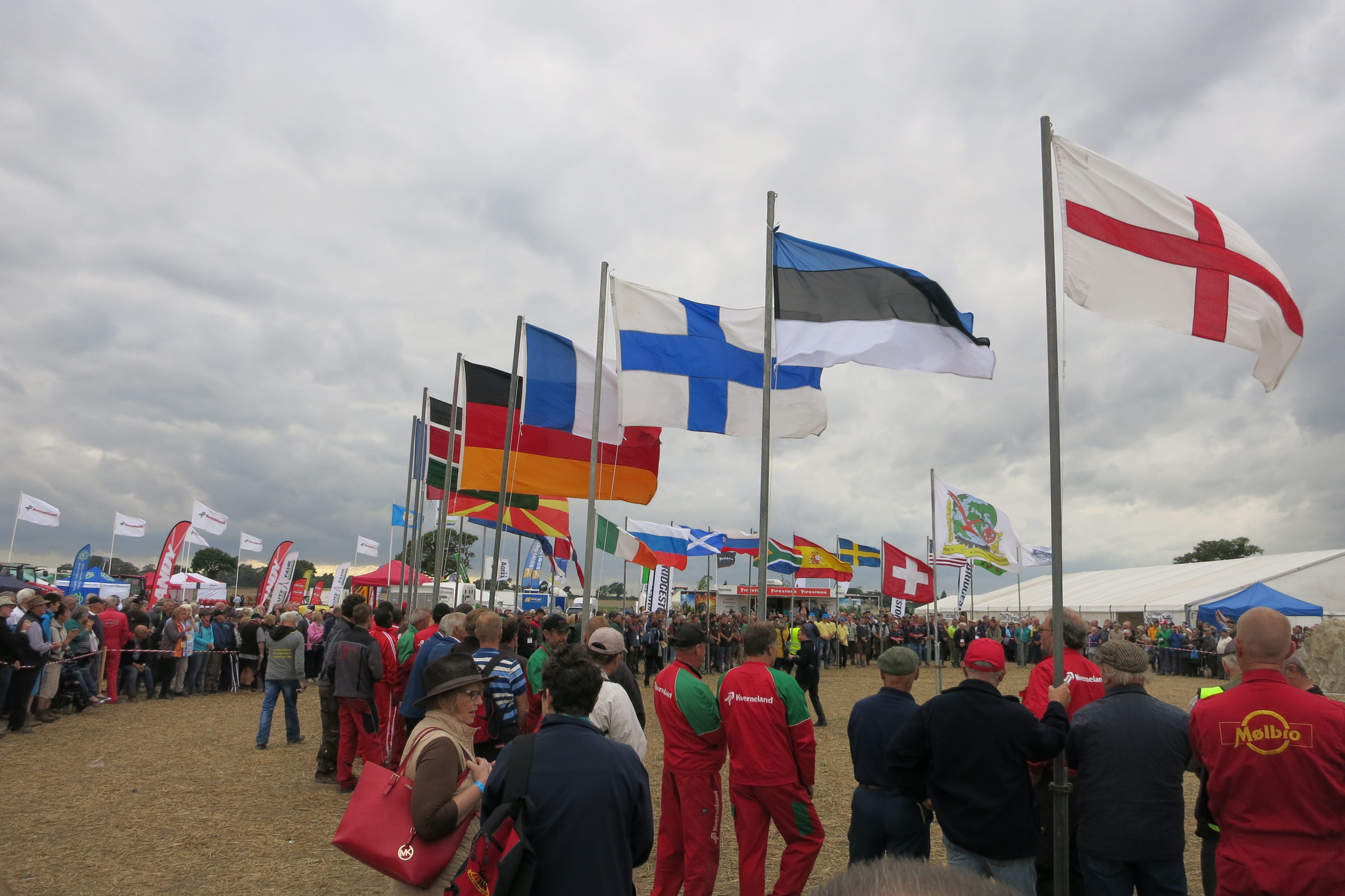 Teilnehmer der Weltpflügermeisterschaft 2016 in York/England beim traditionellen Flaggenhissen vor dem ersten Wettkampftag.